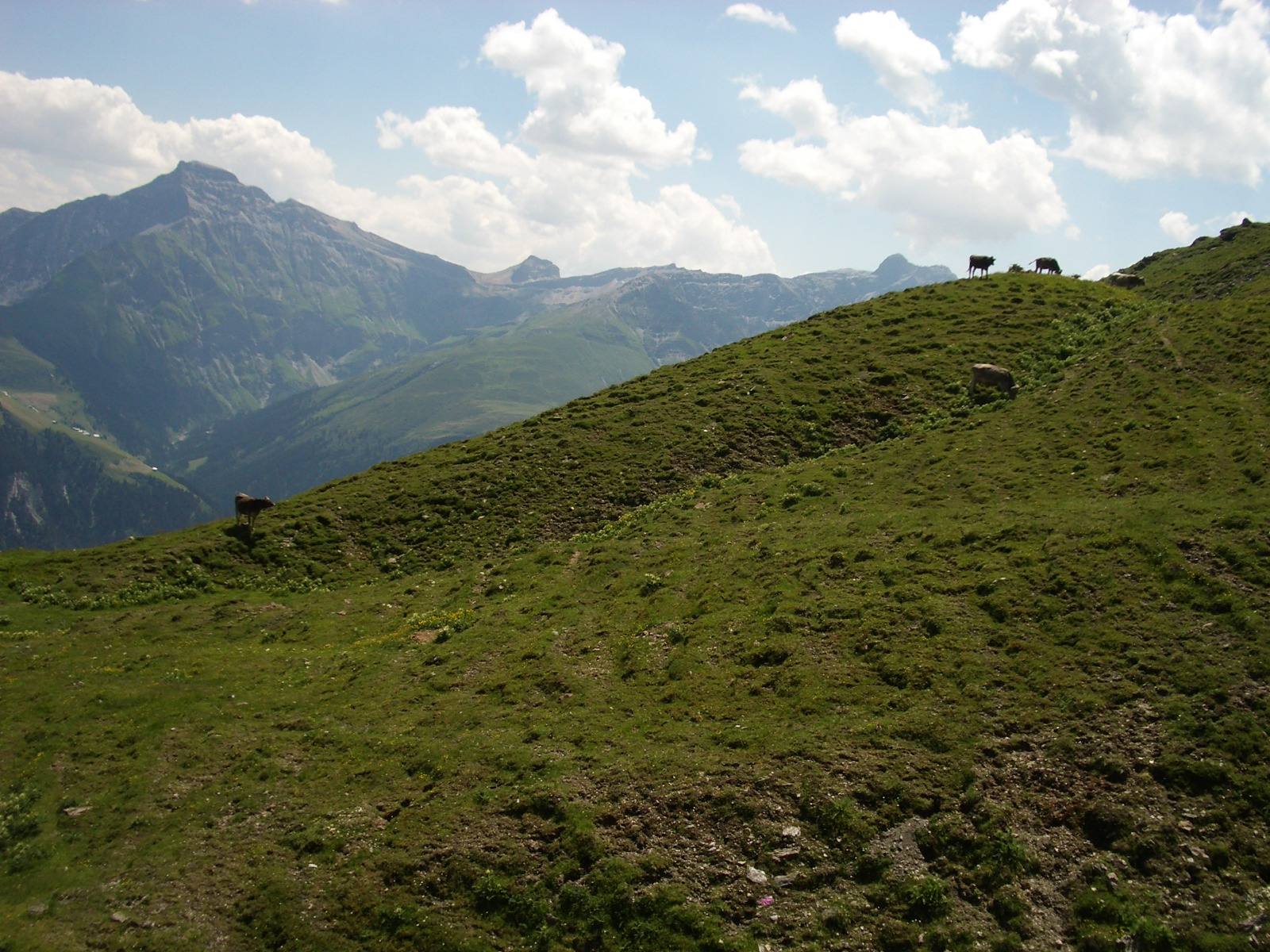 Safien GR, Switzerland self-made, July 2006